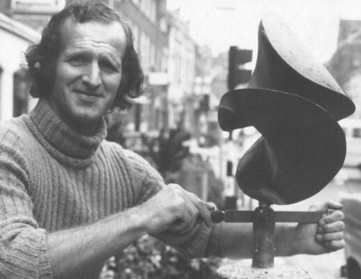 In 1974 heeft Slock een beeld gemaakt dat nog steeds in de Molenstraat te Roosendaal.